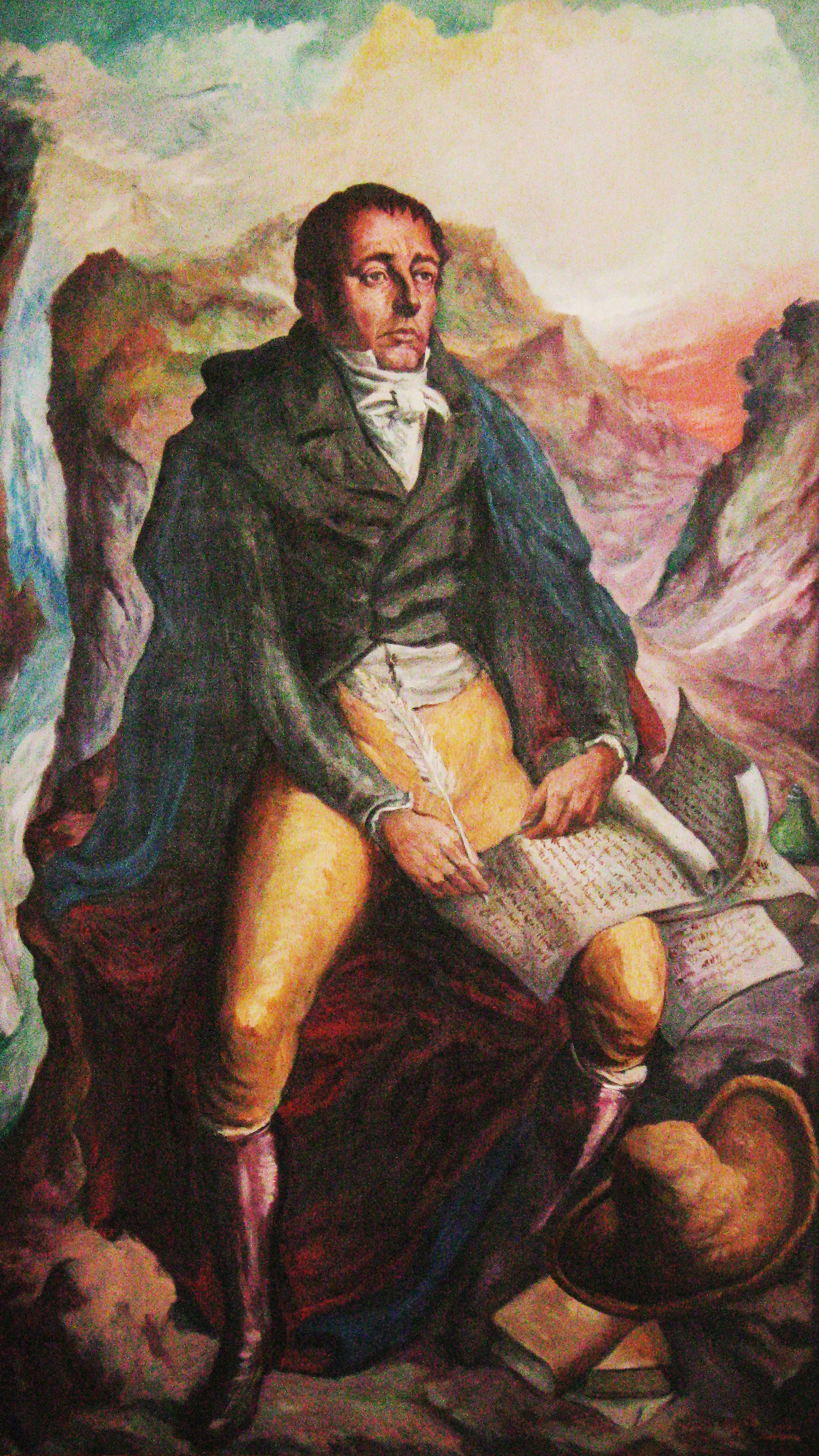 José Faustino Sánchez Carrión Rodríguez